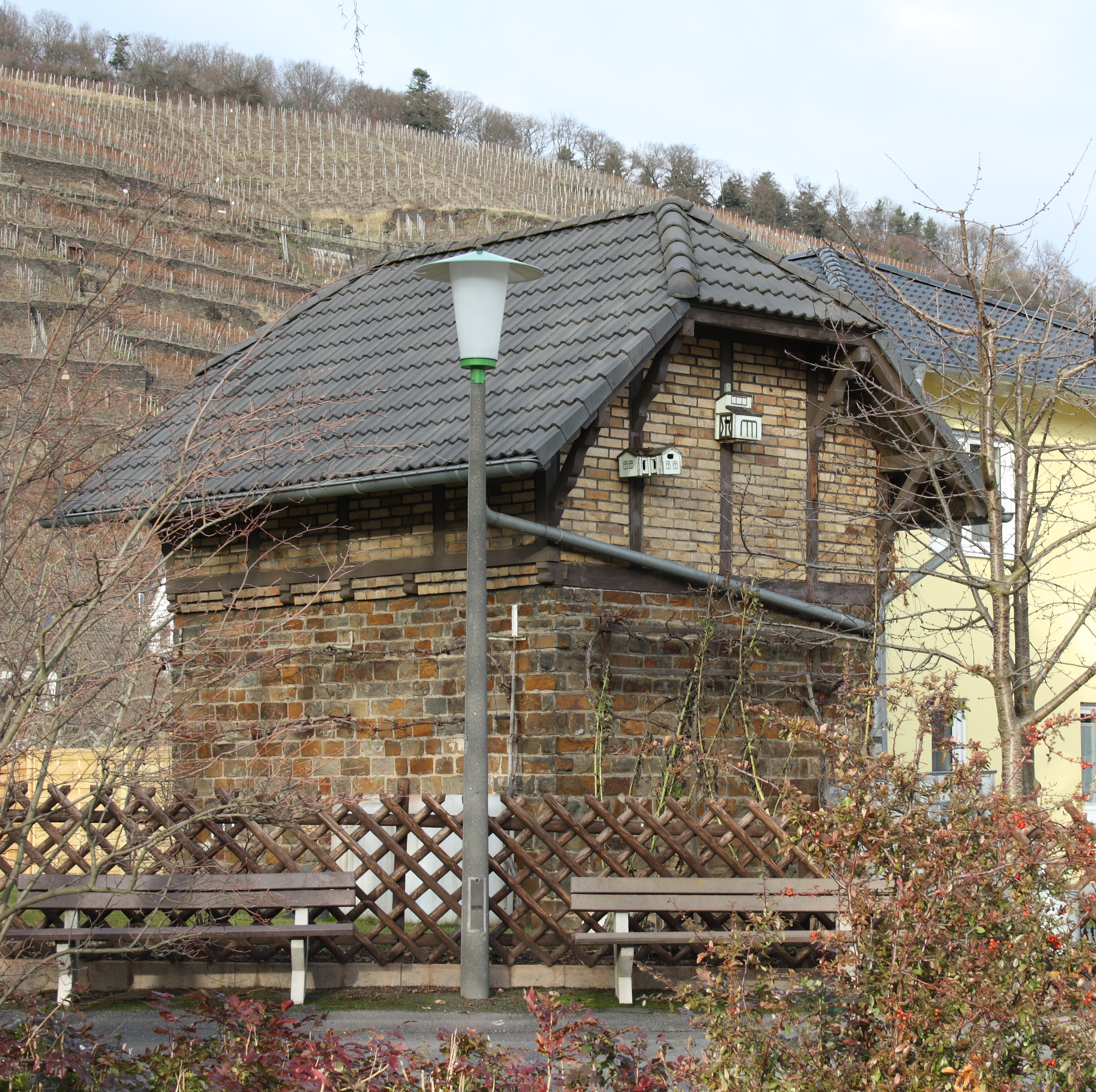 Nebengebäude des ehemaligen Bahnhofs von Walporzheim, Neue Domherrenstraße 4, erbaut 1866